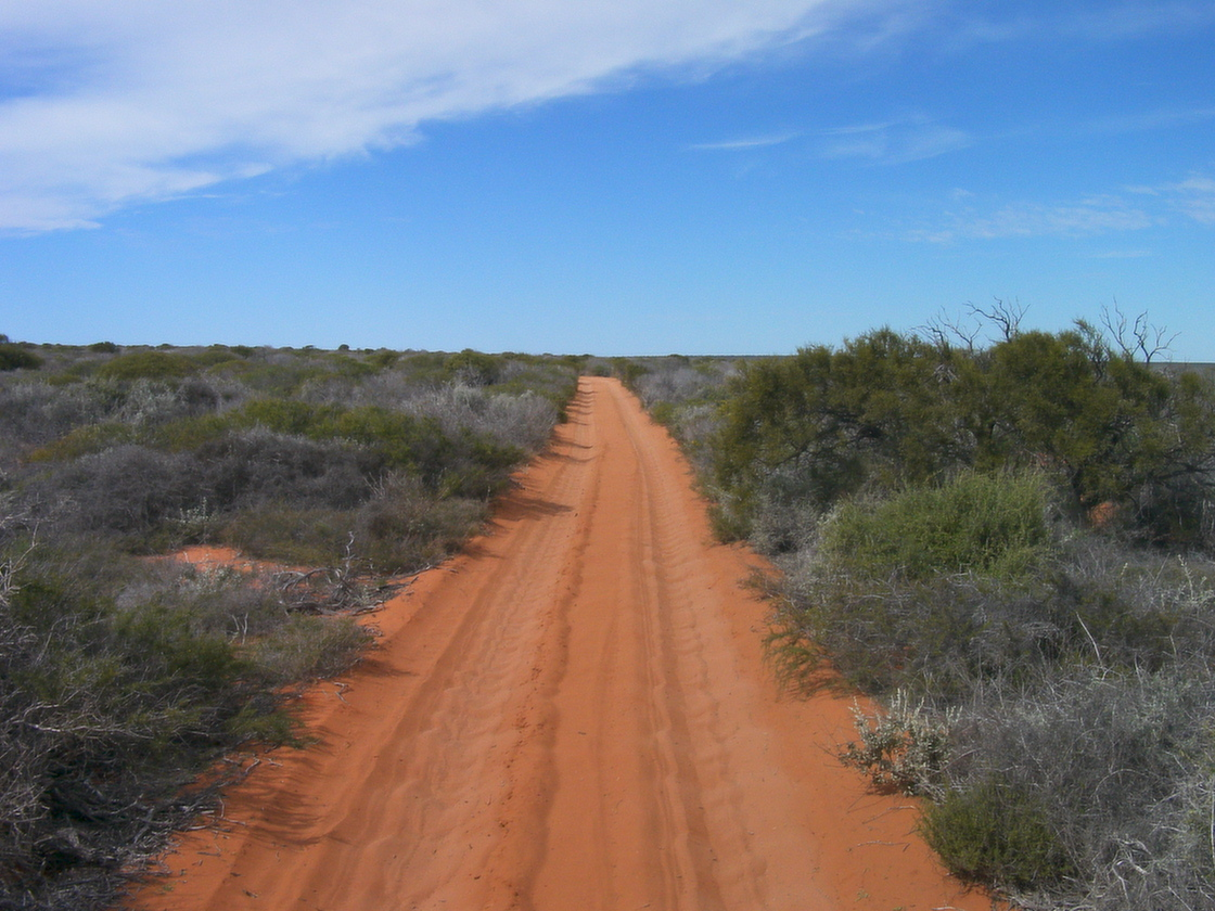 4WD-Track im Francois Peron Nationalpark in West Australien